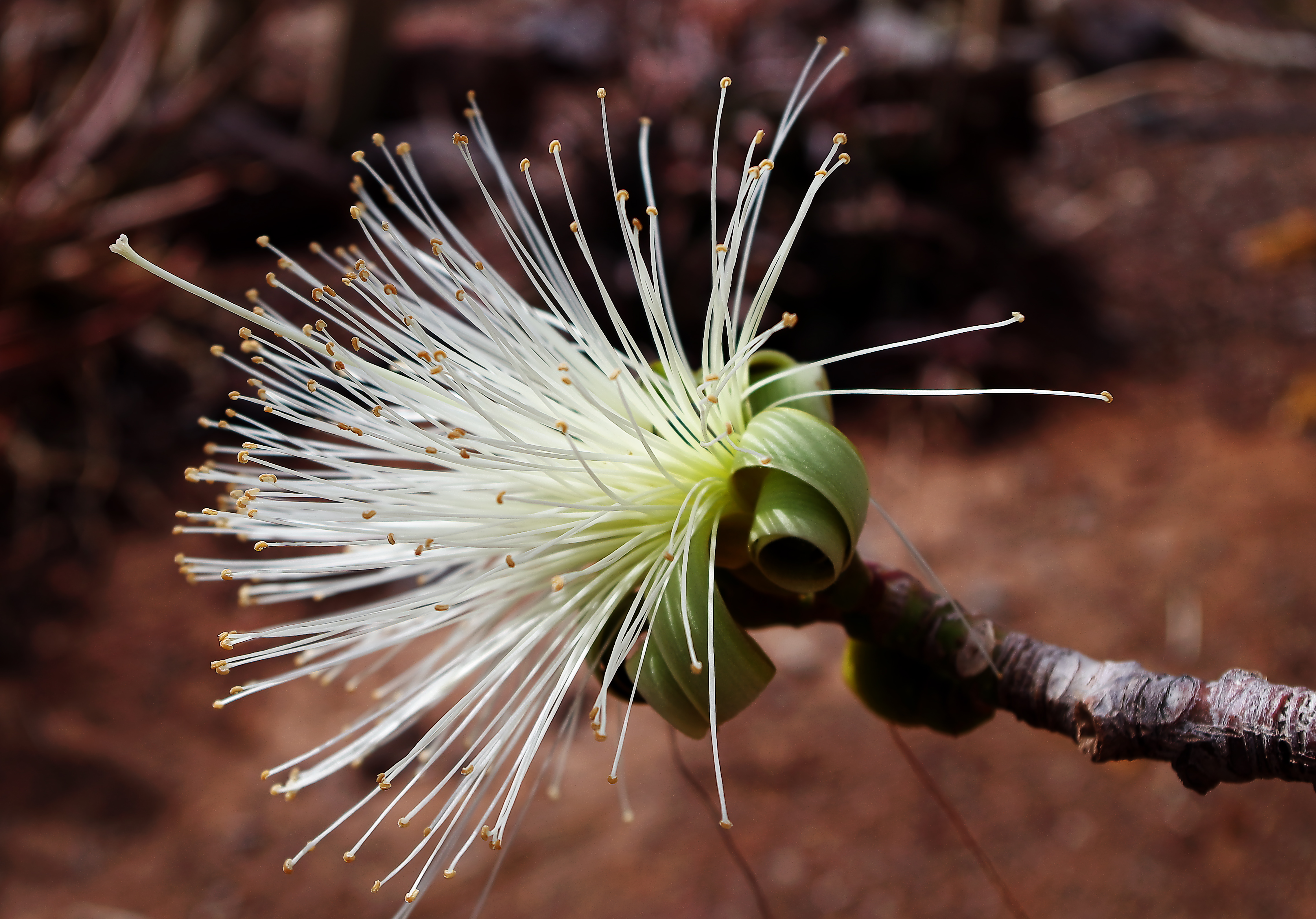 Etranges pistils de plante inconnue - Oasis Park - Fuerteventura